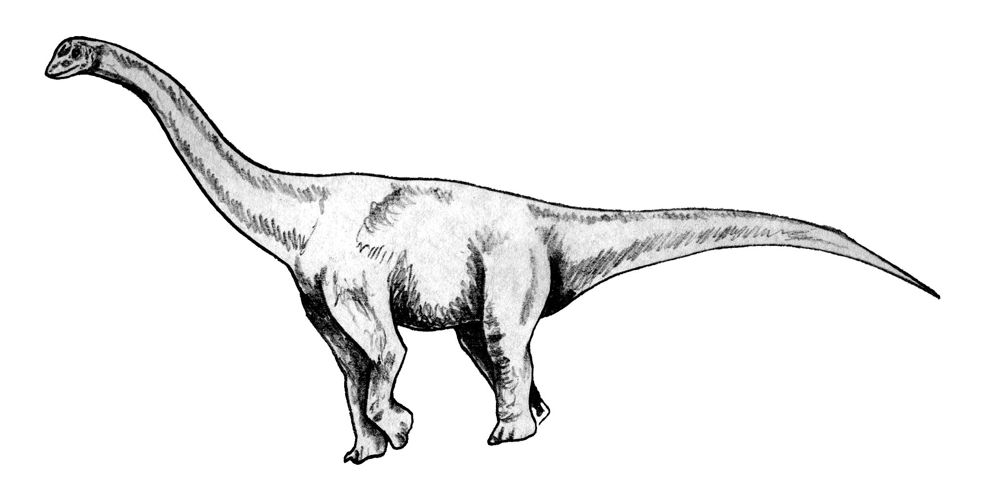 Barapasaurus tagorei, an early sauropod